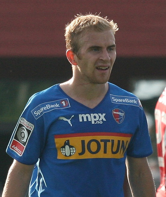 Kari Arkivuo, Sandefjord